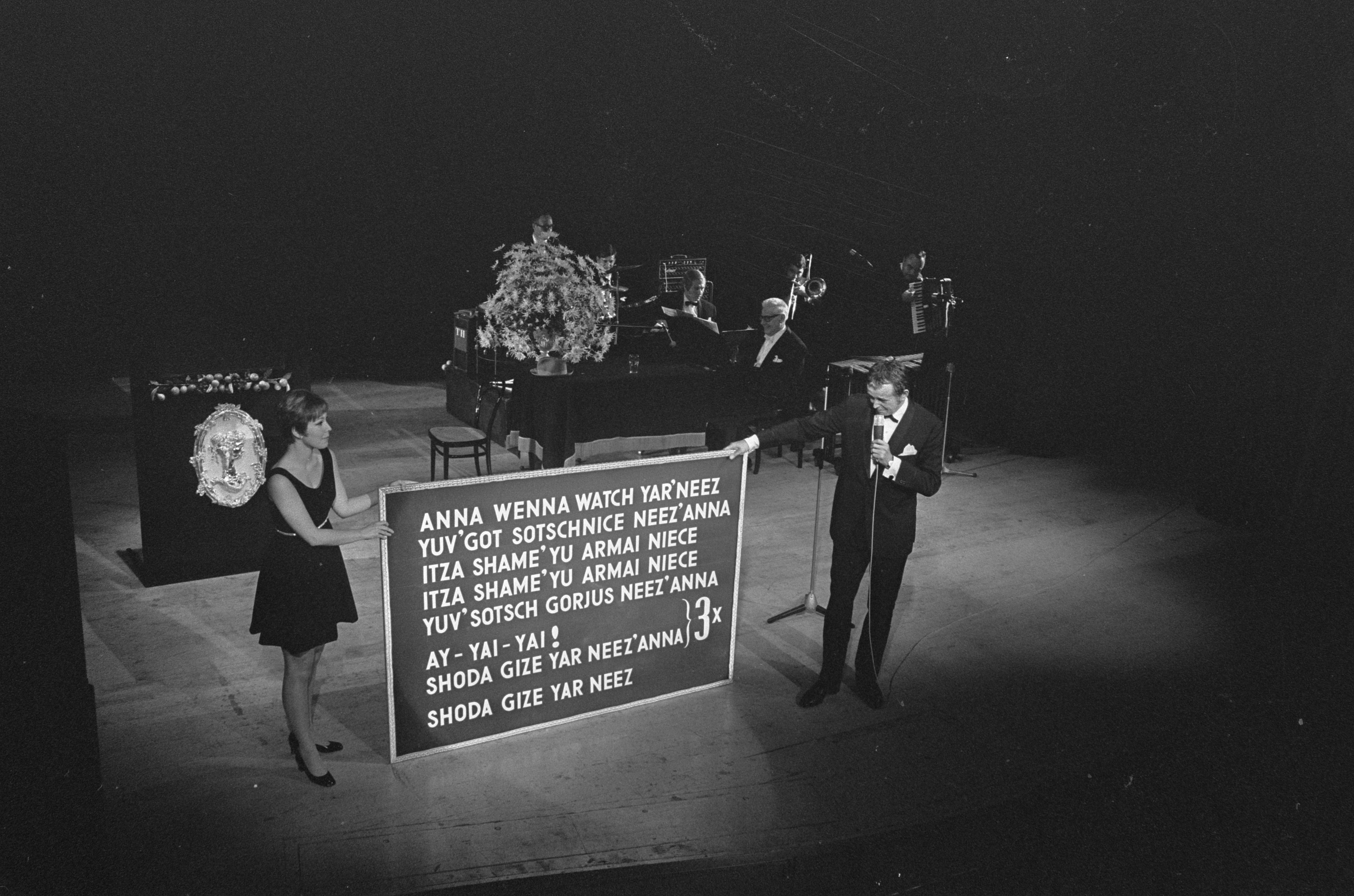 Collectie / Archief : Fotocollectie Anefo Reportage / Serie : Gala première Toon Hermans te Maastricht Beschrijving : Toon Hermans in zijn show, geasisteerd door de dochter van Albert Mol Datum : 9 augustus 1968 Locatie : Limburg, Maastricht Trefwoorden : premières, shows Persoonsnaam : Hermans, Toon Fotograaf : Fotograaf Onbekend / Anefo Auteursrechthebbende : Nationaal Archief Materiaalsoort : Negatief (zwart/wit) Nummer archiefinventaris : bekijk toegang 2.24.01.05 Bestanddeelnummer : 921-5859 Reacties Geplaatst door Cultuurmens op 22 november 2017 - 14:22. Amerikaanse one-man-show. Persoonsnaam: Mol, Kika NB. Dochter van Albert Mol is Kika Mol.